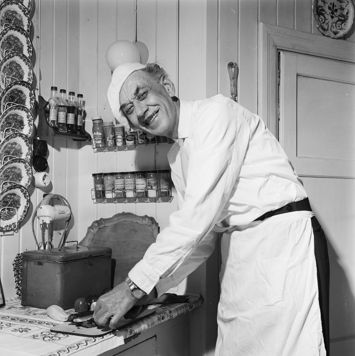 Leif Enger (1900-1977) var en norsk skuespiller.